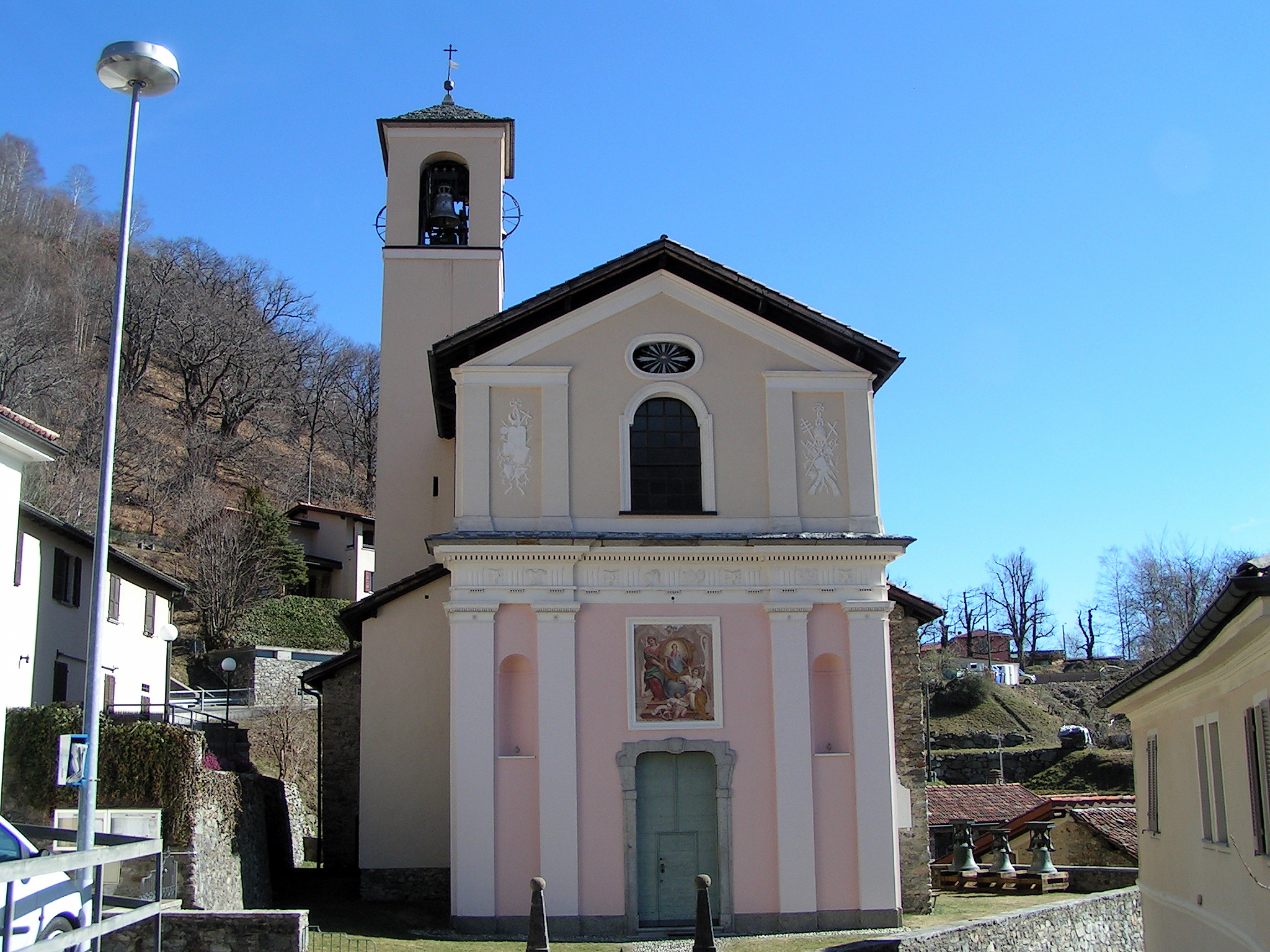 Chiesa di Sant'Agata a Mugena, frazione di Alto Malcantone